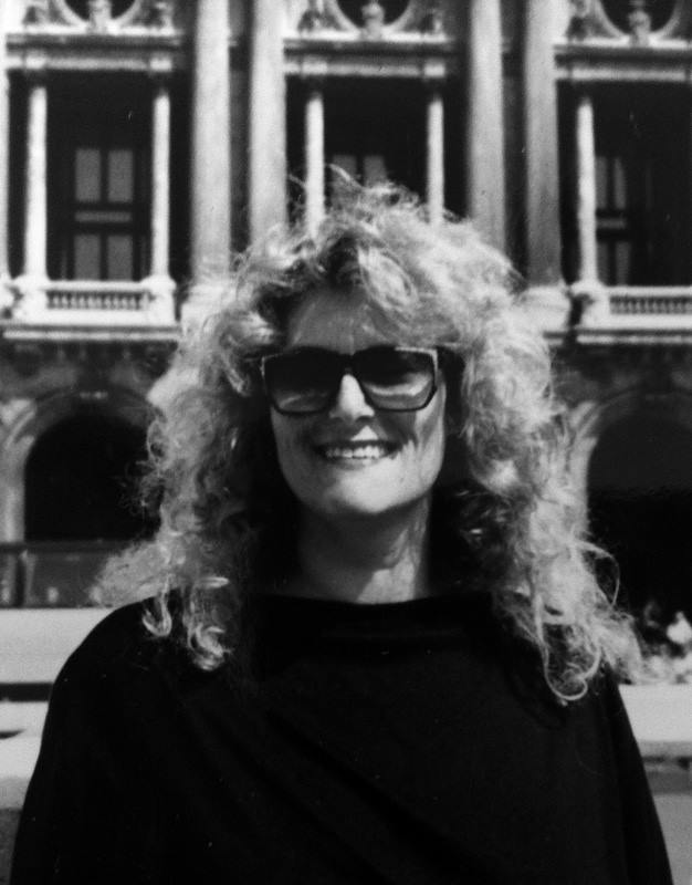 פרופ' מרים גורצקי בילו, מעצבת במה ותלבושות, מרצה וראש התכנית לעיצוב במה קולנוע וטלוויזיה באוניברסיטת תל אביב